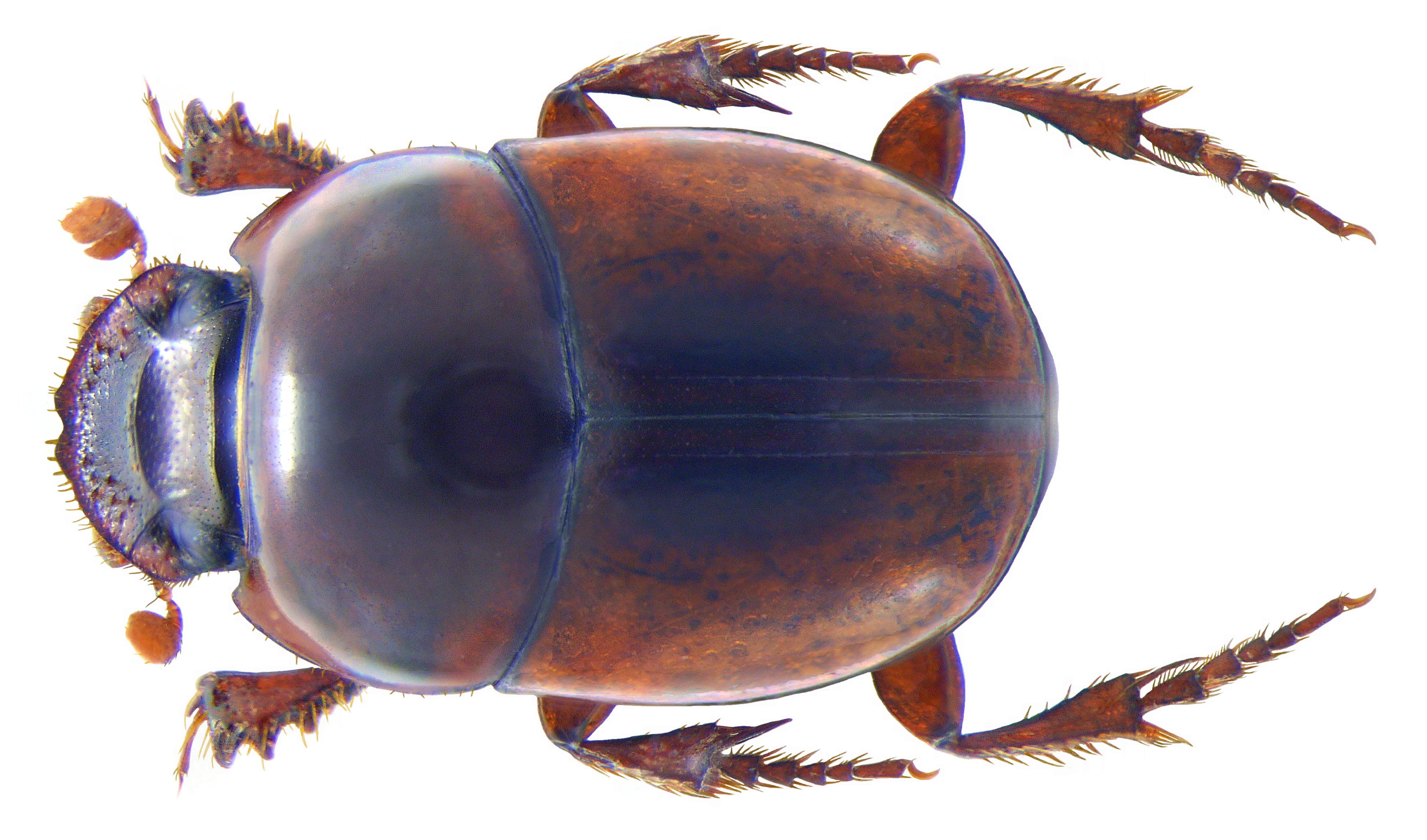 Familie: Scarabaeidae Grösse: 5 mm Fundort: Kenia, Tsavo National Park leg.det. U.Schmidt, 1991 Foto: U.Schmidt, 2009